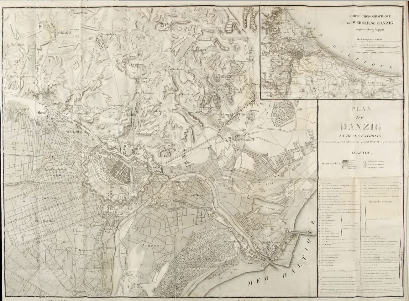 Plan der Stadt Danzig und Umgebung im Kriegsjahr 1813